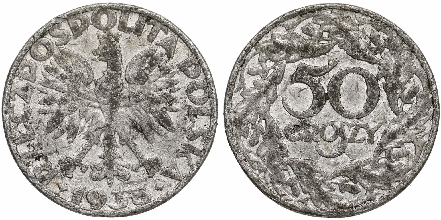 Fałszerstwo z epoki 50 groszy 1938